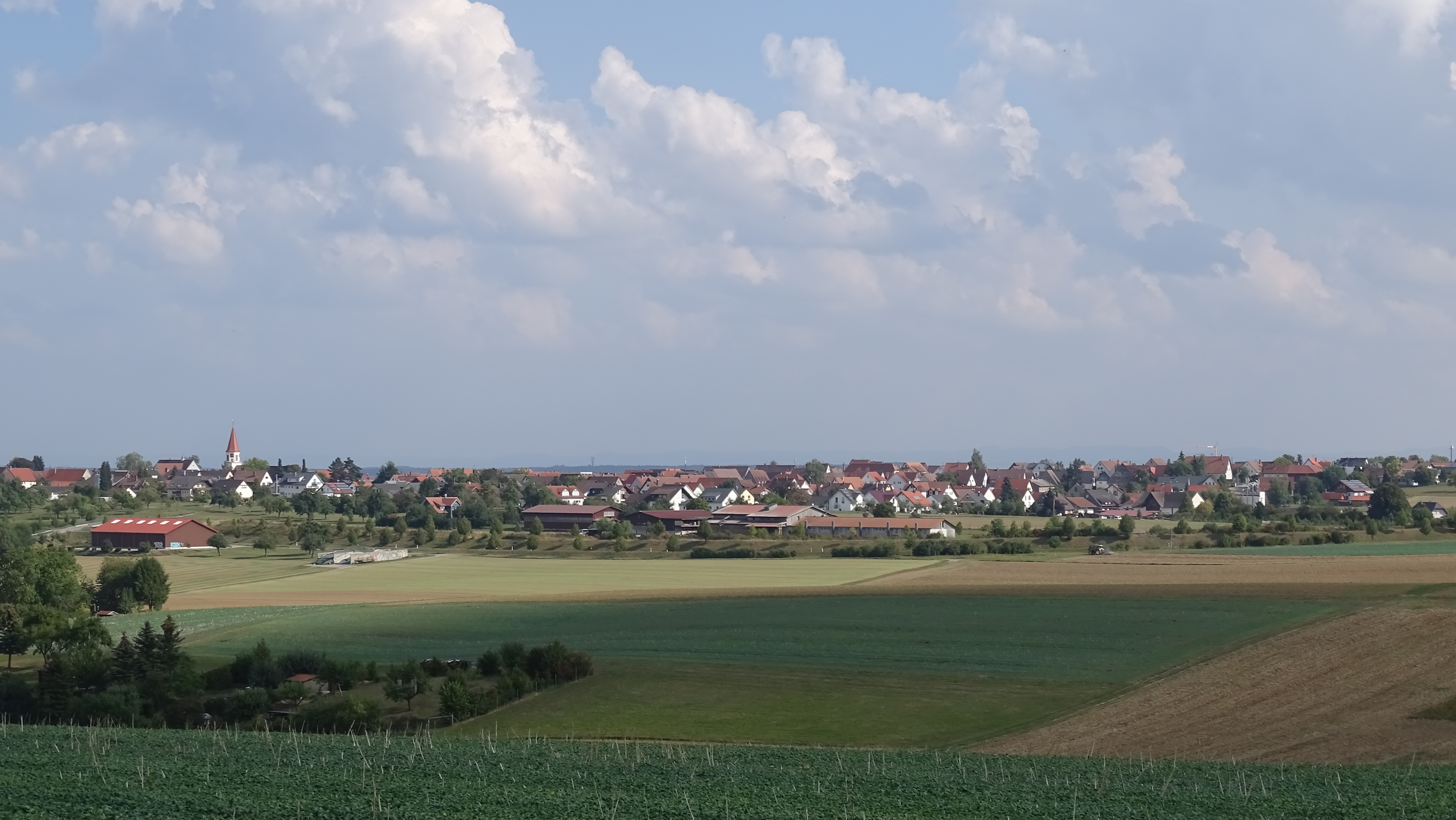 Ansichten von Deckenpfronn